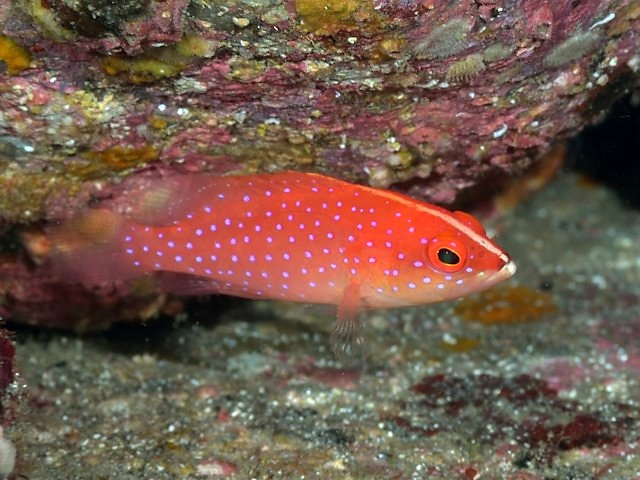 オジロバラハタyg Variola albimarginata